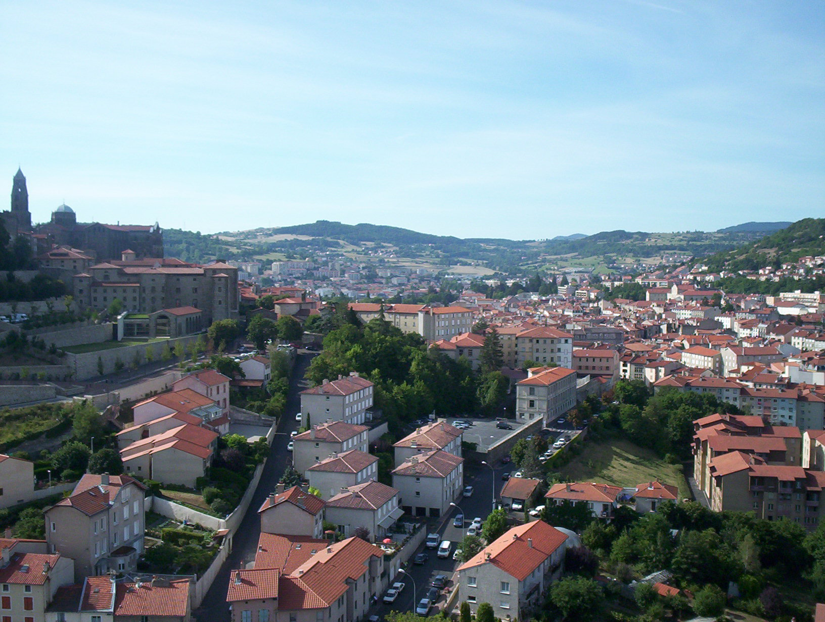 Le Puy-en-Velay, dép. de la Haute-Loire, France. Vue générale prise de la chapelle Saint-Michel d'Aiguilhe.